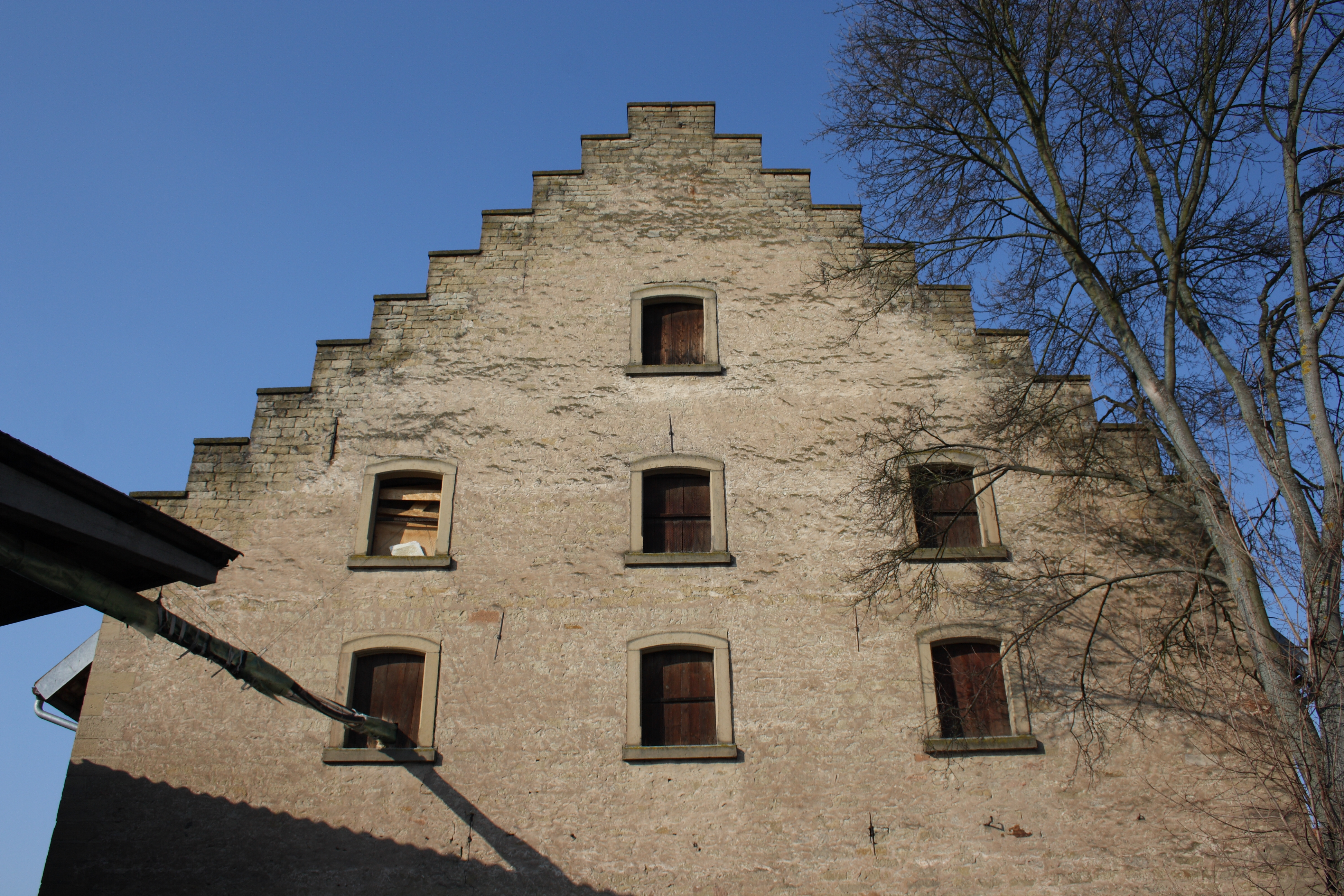 Rentamt in Sulzfeld (Baden)